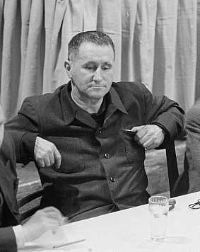 Original image description from the Deutsche Fotothek Blick auf die Bühne mit den Kultur- und SED-Funktionären, unter anderem mit Bertolt Brecht (2. von links)